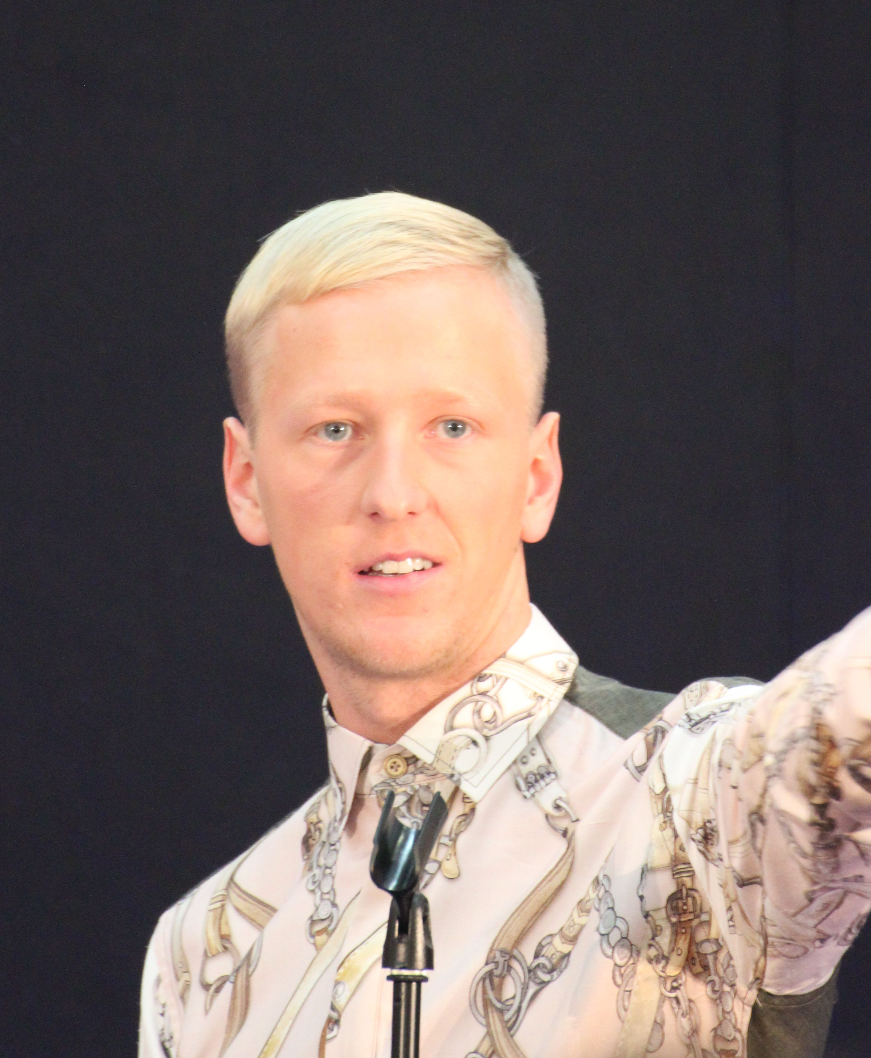 Ženja Fokin õhtujuhina Kristiine keskuses.